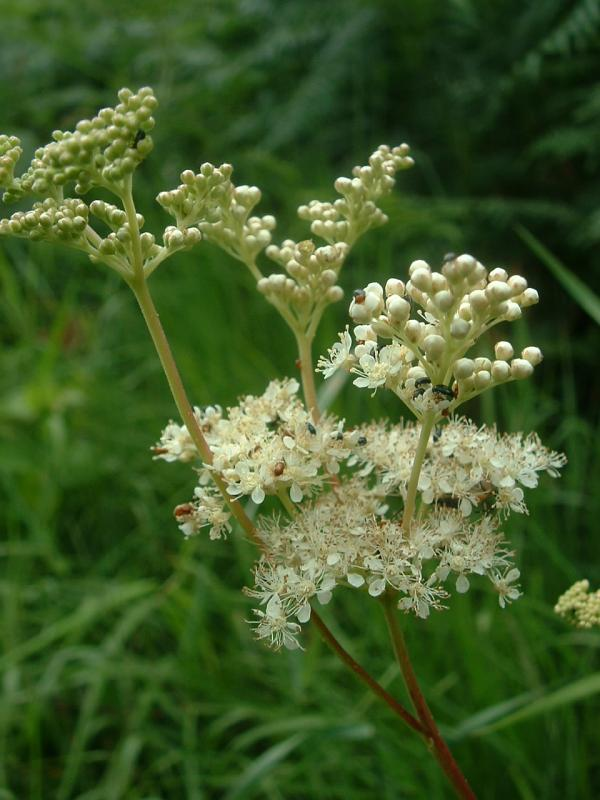 Reine des prés, Vantoux-et-Longevelle